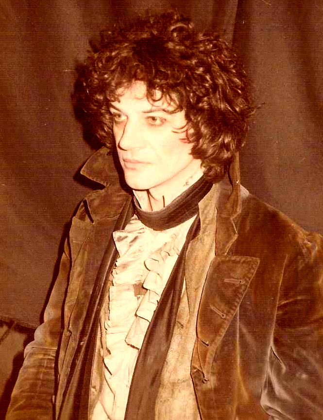 René-Louis Baron joue dans la première comédie musicale de l'œuvre de Victor Hugo "Les Misérables" mise en scène par Robert Hossein à Paris en 1980.